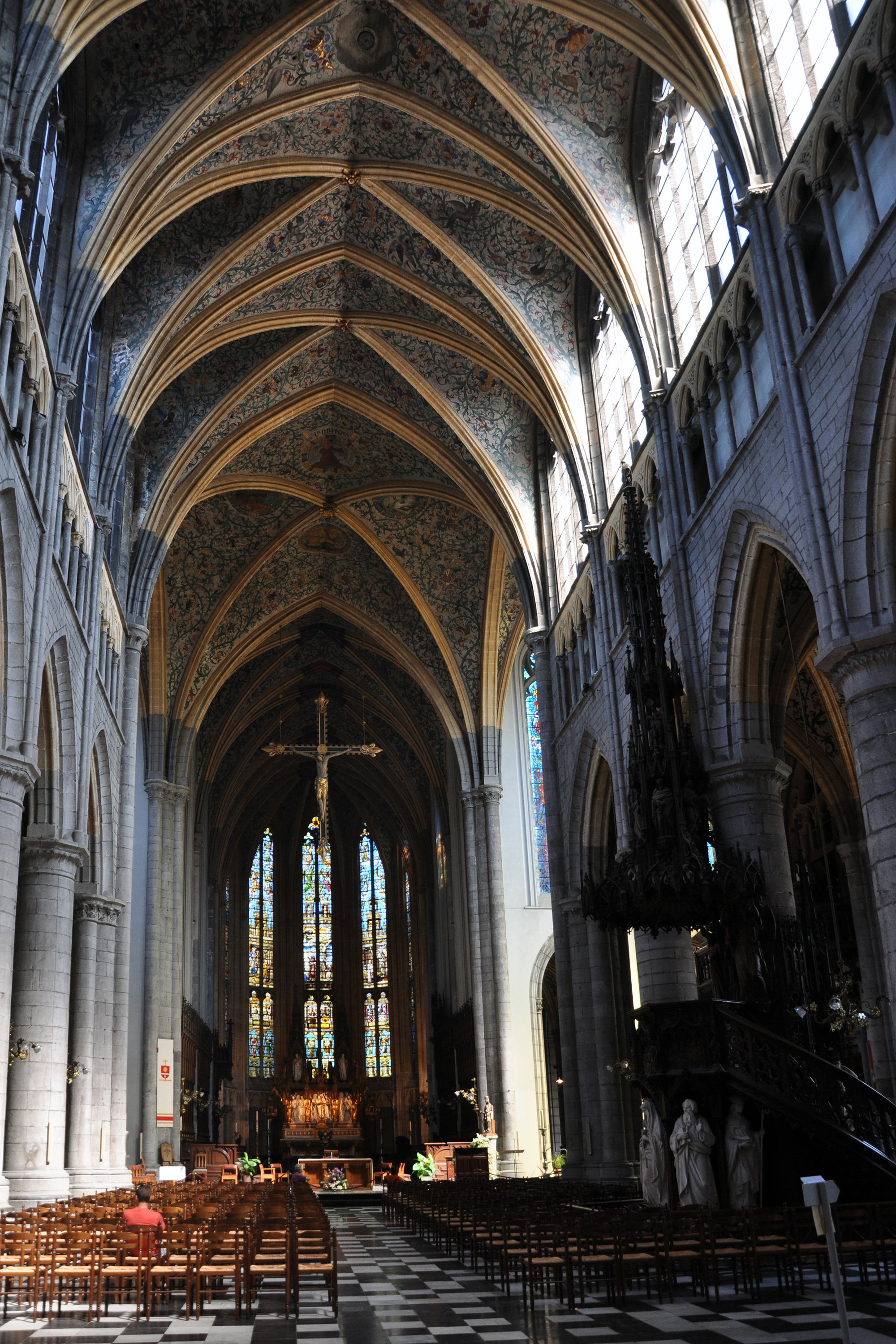 Cathédrale Saint-Paul de Liège.